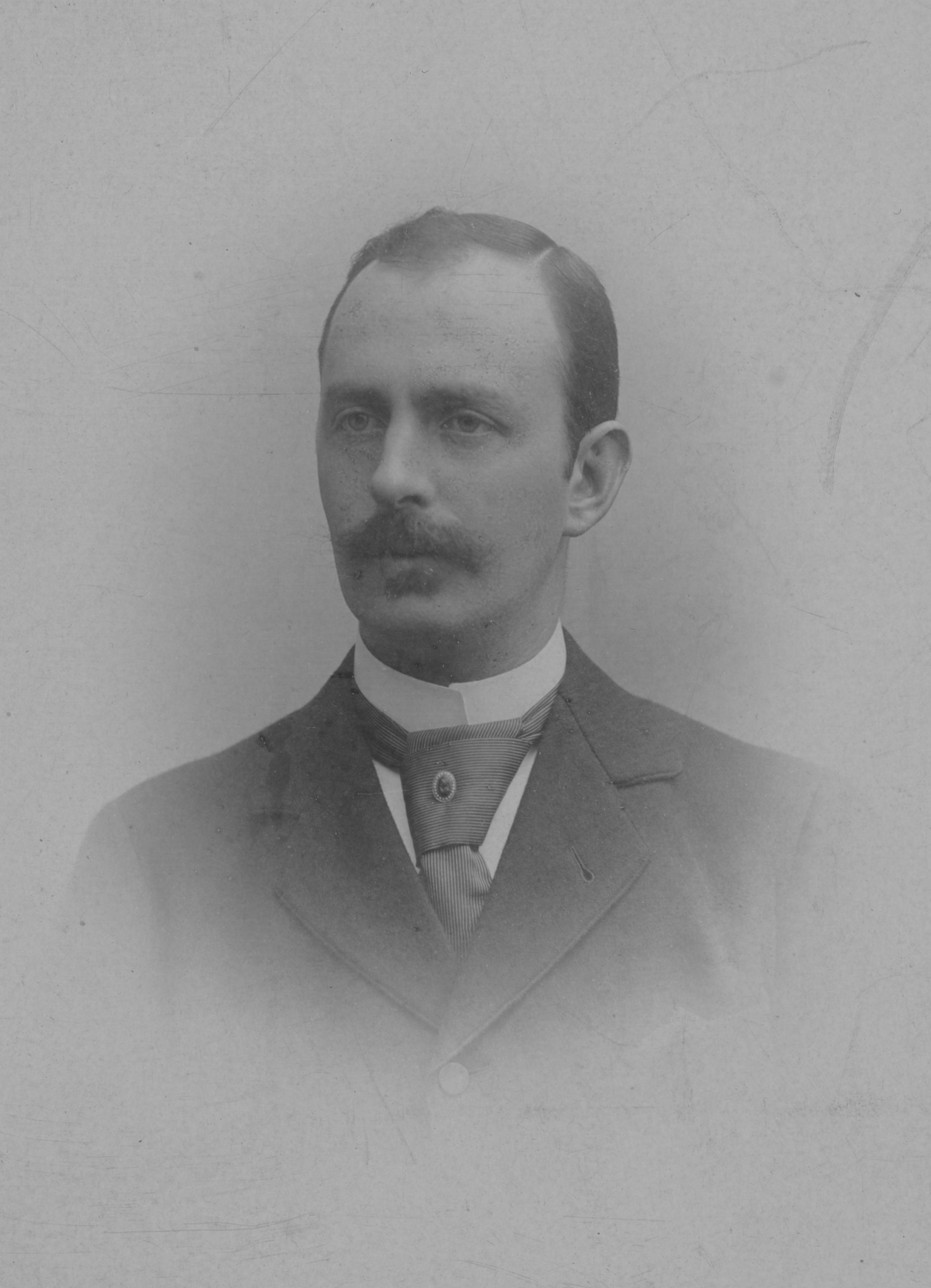 Simon Nicolay Wiborg (1867–1946), skipsreder, iseksportør, stortingsmann og ordfører i Kragerø.